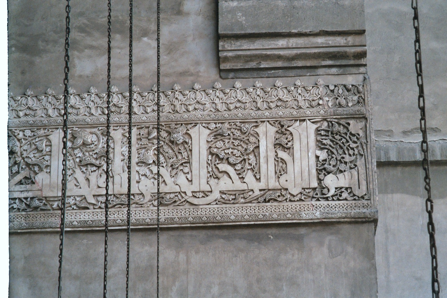 Bismillah koufique sur le mur de la mosquée du Sultan Hasan